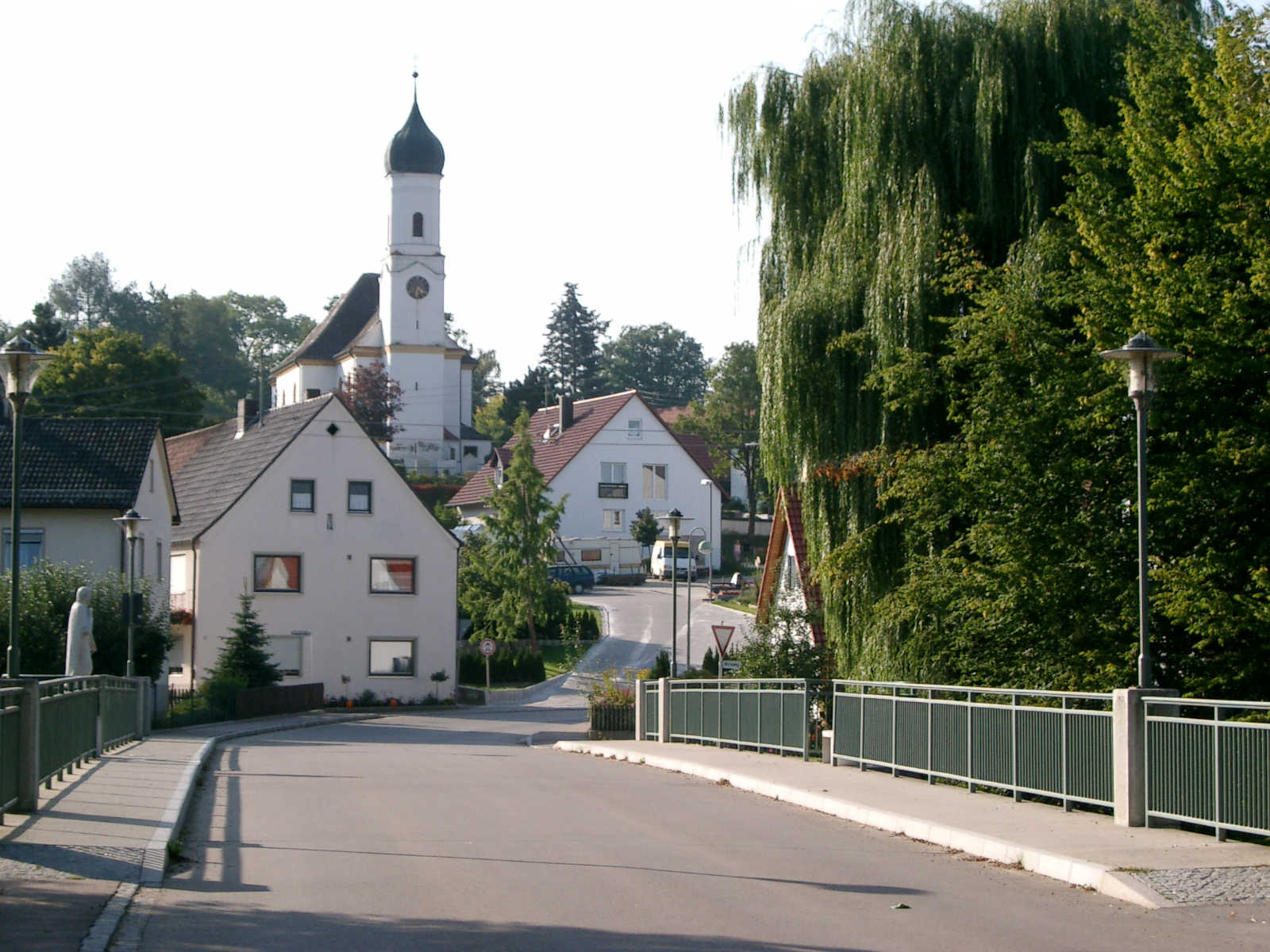 Kath. Pfarrkirche St. Vitus, Druisheim